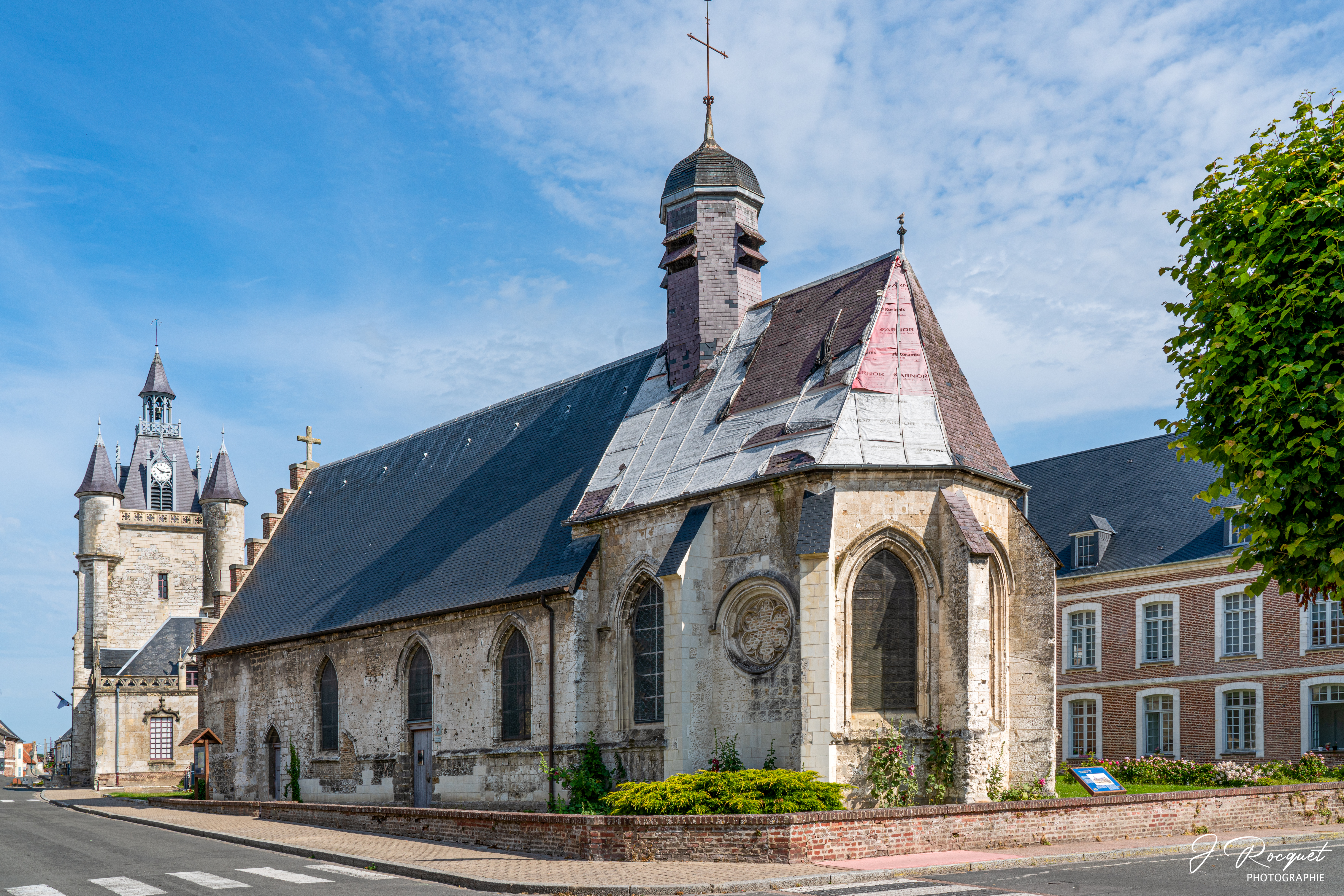 La chapelle de l'Hospice dédiée à Saint Nicolas et à Saint Jacques. (Au fond à gauche : le beffroi).